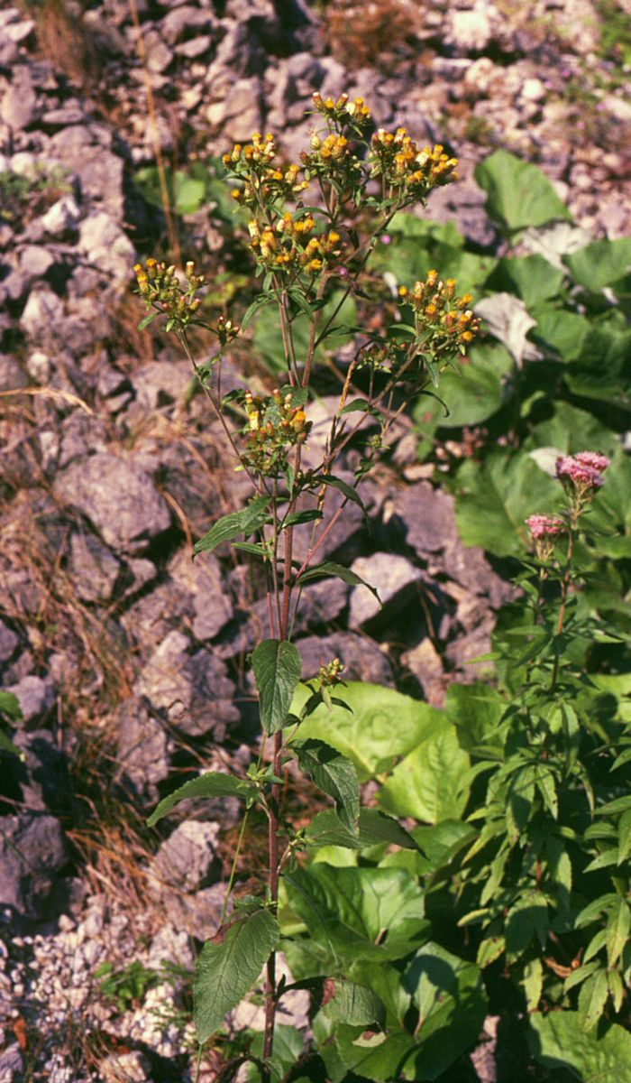 Dürrwurz (Inula conyzae), Korbblütler (Asteraceae) - Österreich/Austria/Autriche: Niederösterreich, Erlauftal, Vordere Tormäuer